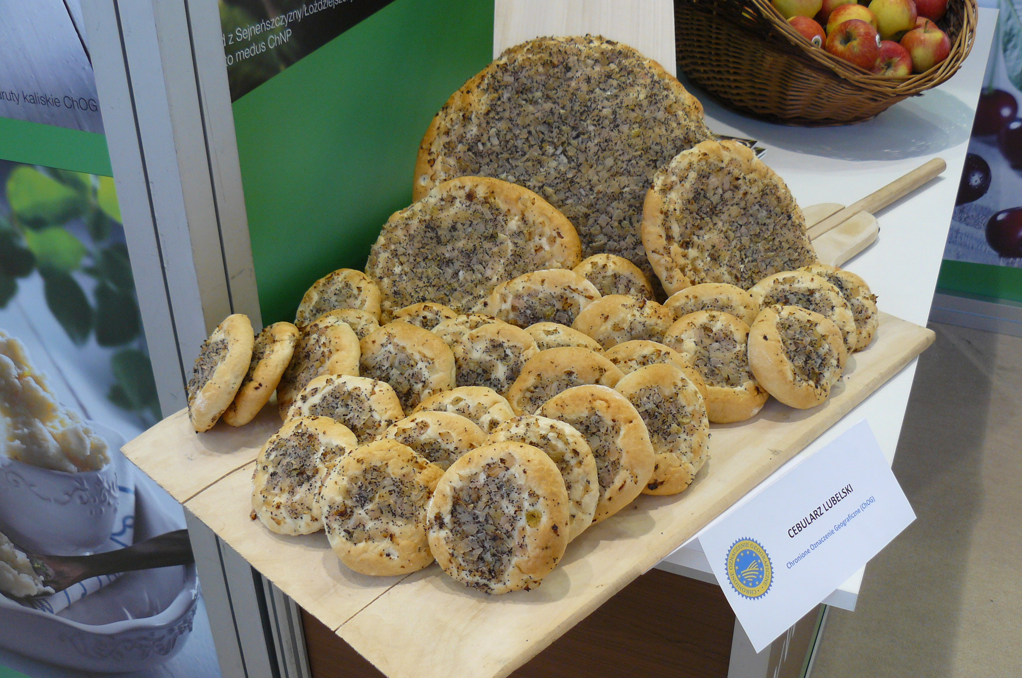 Cebularz lubelski na targach w Poznaniu.